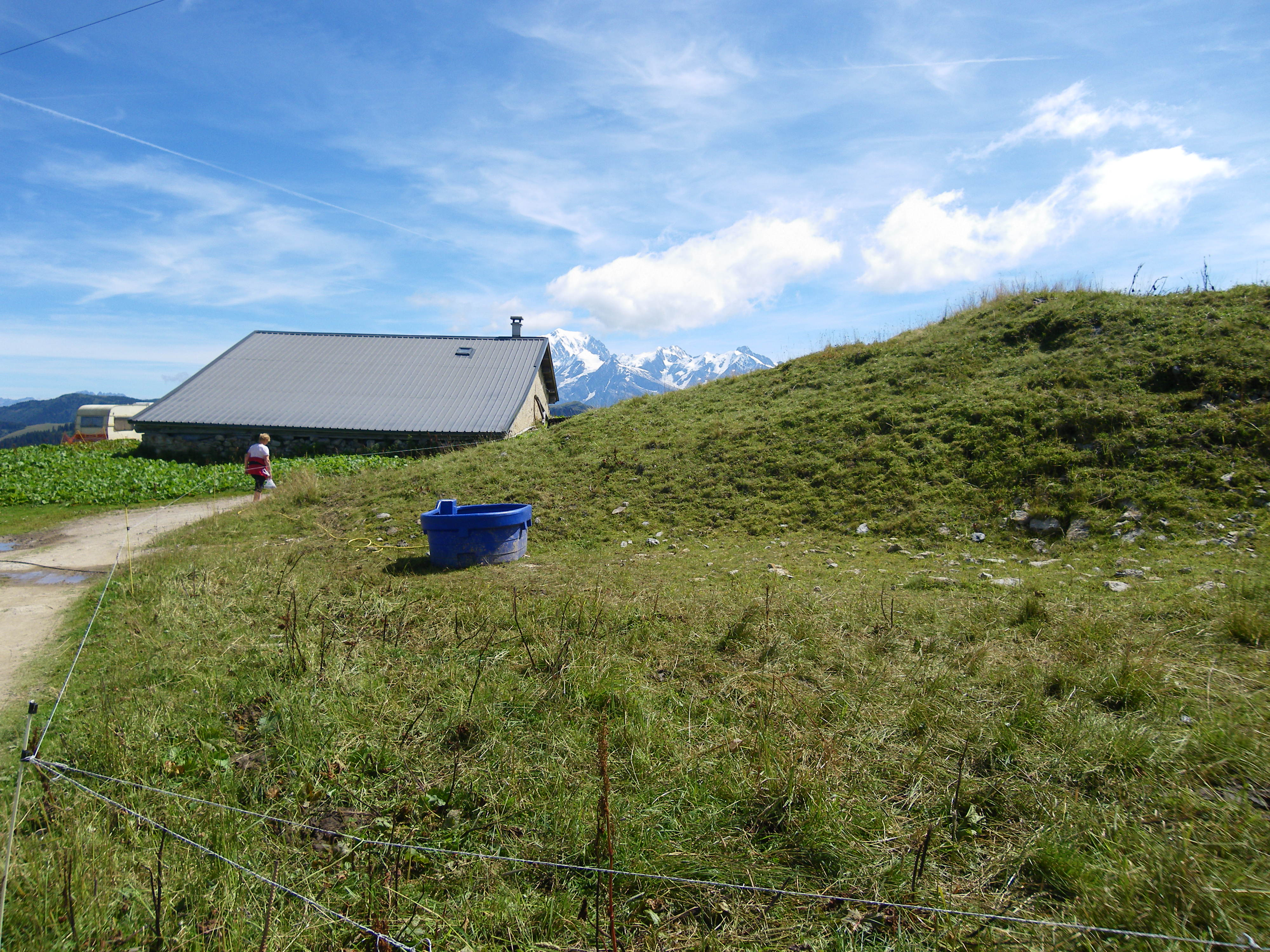 ferme sur les pentes du mont bisanne